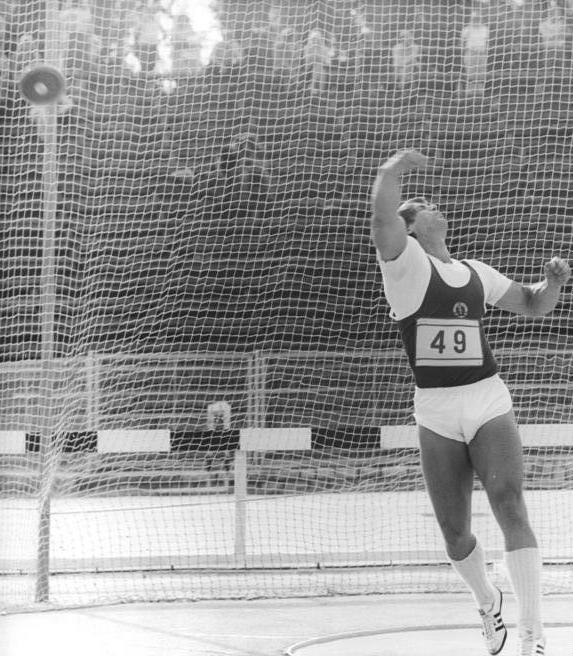 Wolfgang Schmidt ADN-ZB Settnick-09.08.1978-str-Berlin: Schmidt warf Diskusweltrekord-Der Berliner Dynamo-Diskuswerfer Wolfgang Schmidt erzielte am 09.08. in Berlin mit 71,16 m einen neuen Weltrekord. Er übertraf die Bestmarke des US-Amerikaners Mac Wilkins um 30 cm. Der 24jährige Olympiazweite von Montreal hatte bereits am 31.05. einen neuen Europarekord (68,92 m) aufgestellt.(Archivfoto) Wolfgang Schmidt (Sportler)